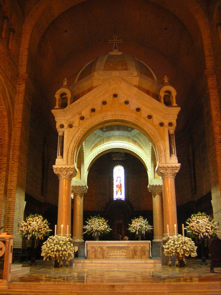 Baldaquino y Altar de la Catedral Metropolitana de Medellín, Colombia.